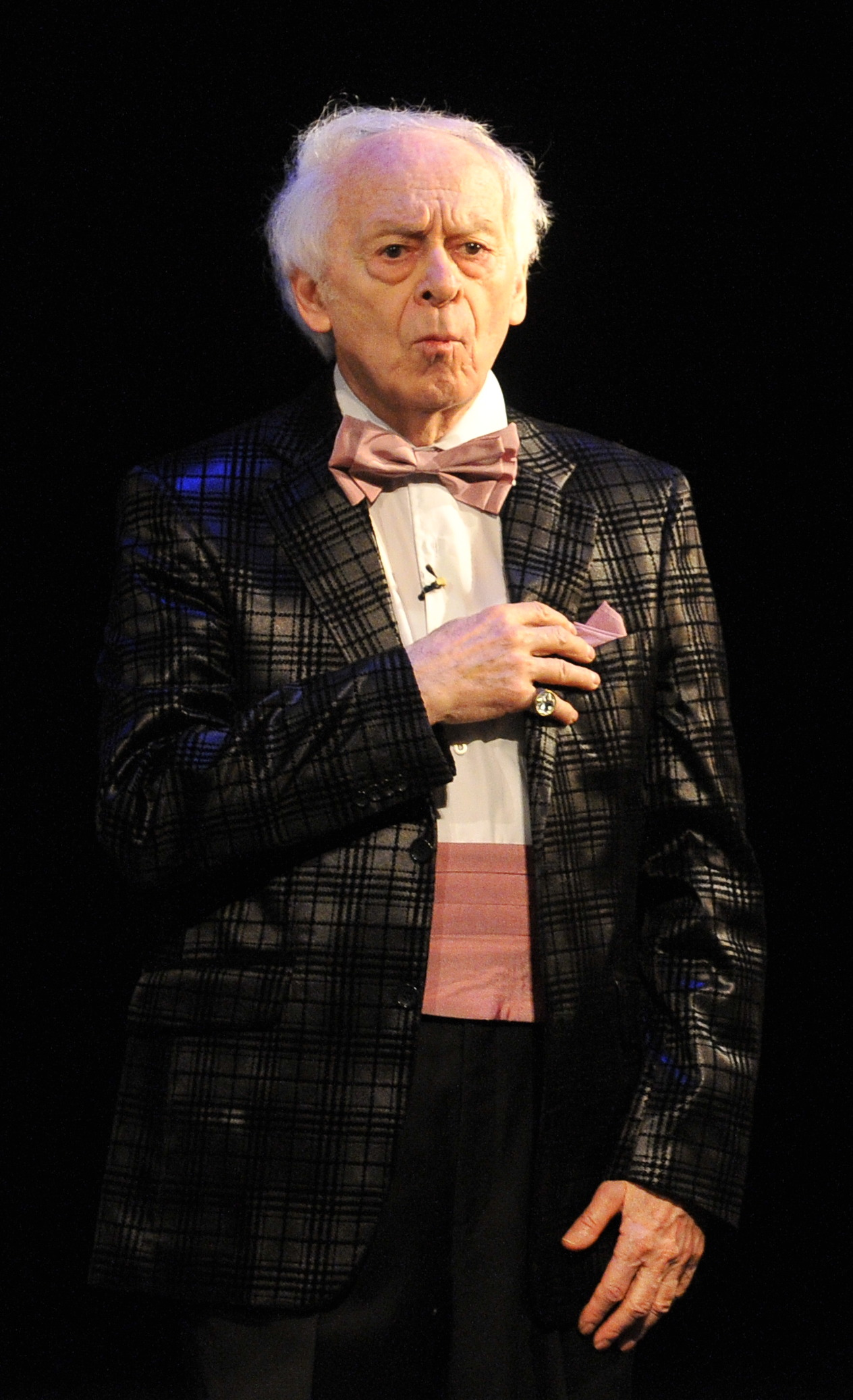 Premijera predstave "Producenti"